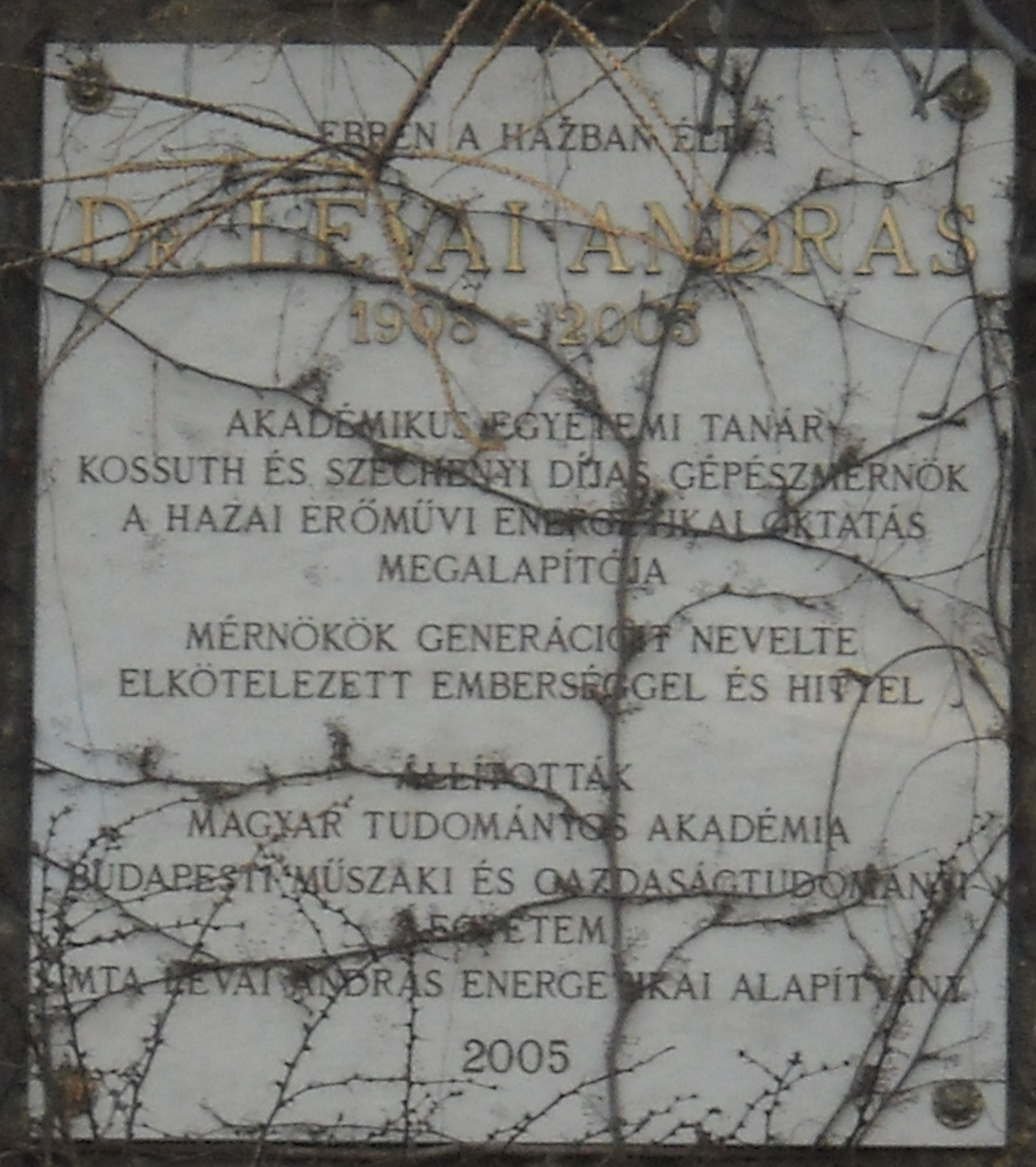 Lévai András emléktáblája - nyáron nem látható, Budapest, II., Fillér utca 56.